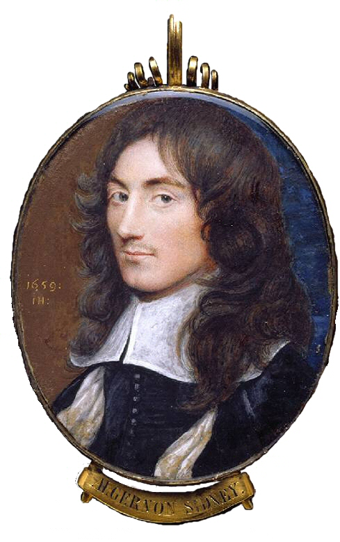 Medaillon Algernon Sidney